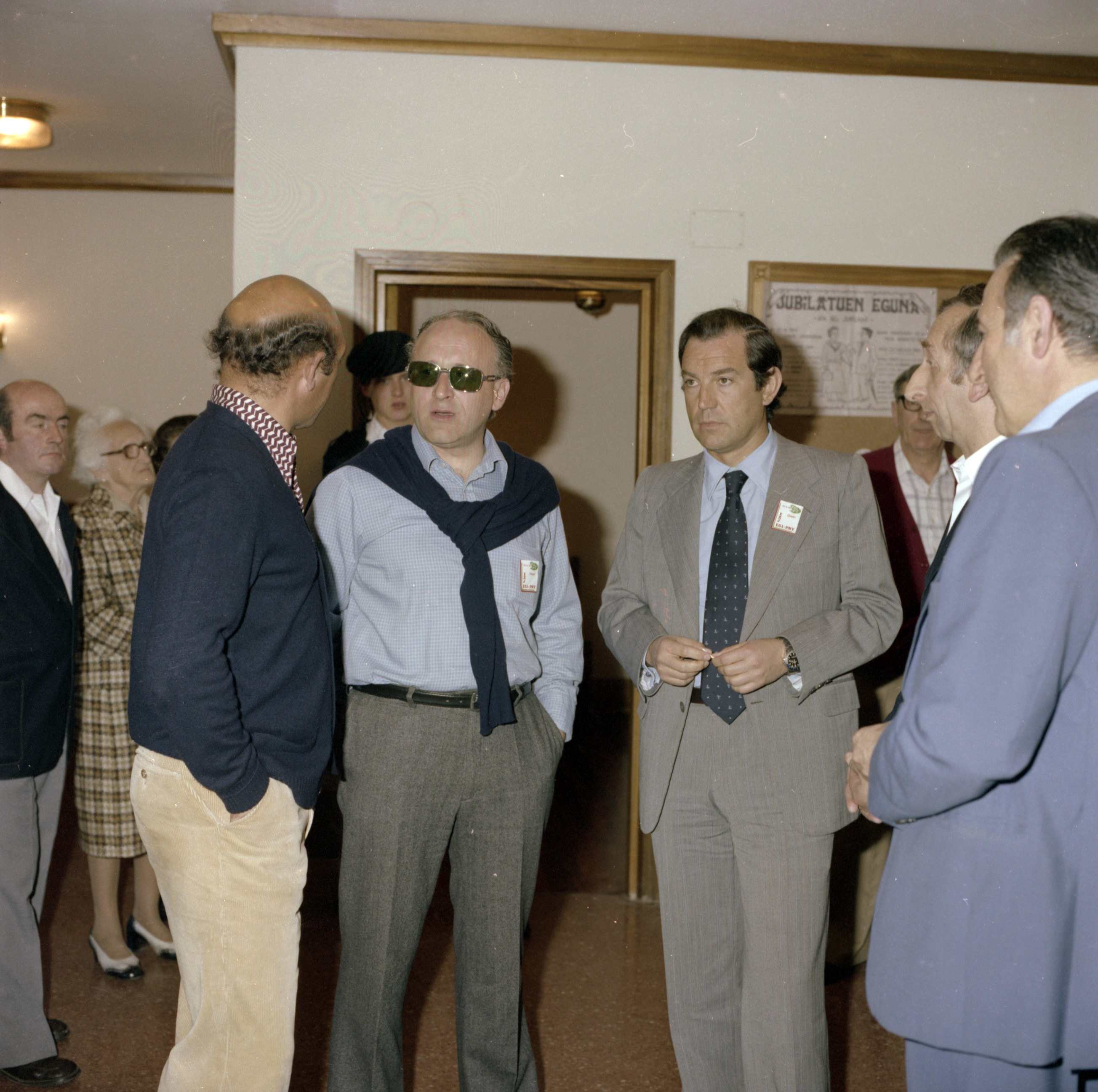 Eli Galdos (a la izquierda, de espaldas), Xabier Arzalluz y Carlos Garaikoetxea en la inauguración del batzoki de Oñate (13 de mayo de 1979)